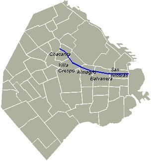 Avenida Corrientes: Trayecto sobre Buenos Aires